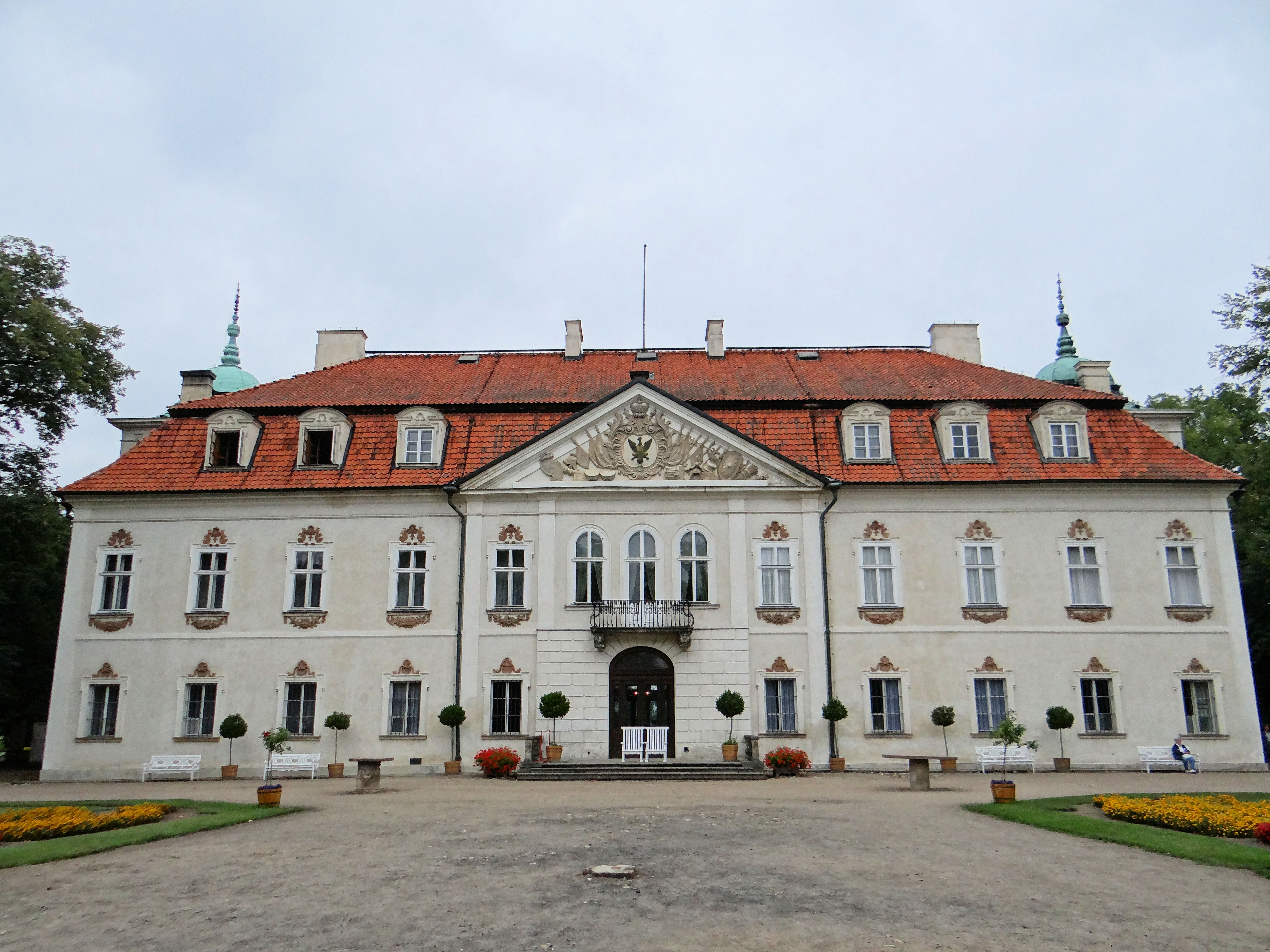 Pałac w Nieborowie - widok od strony ogrodu